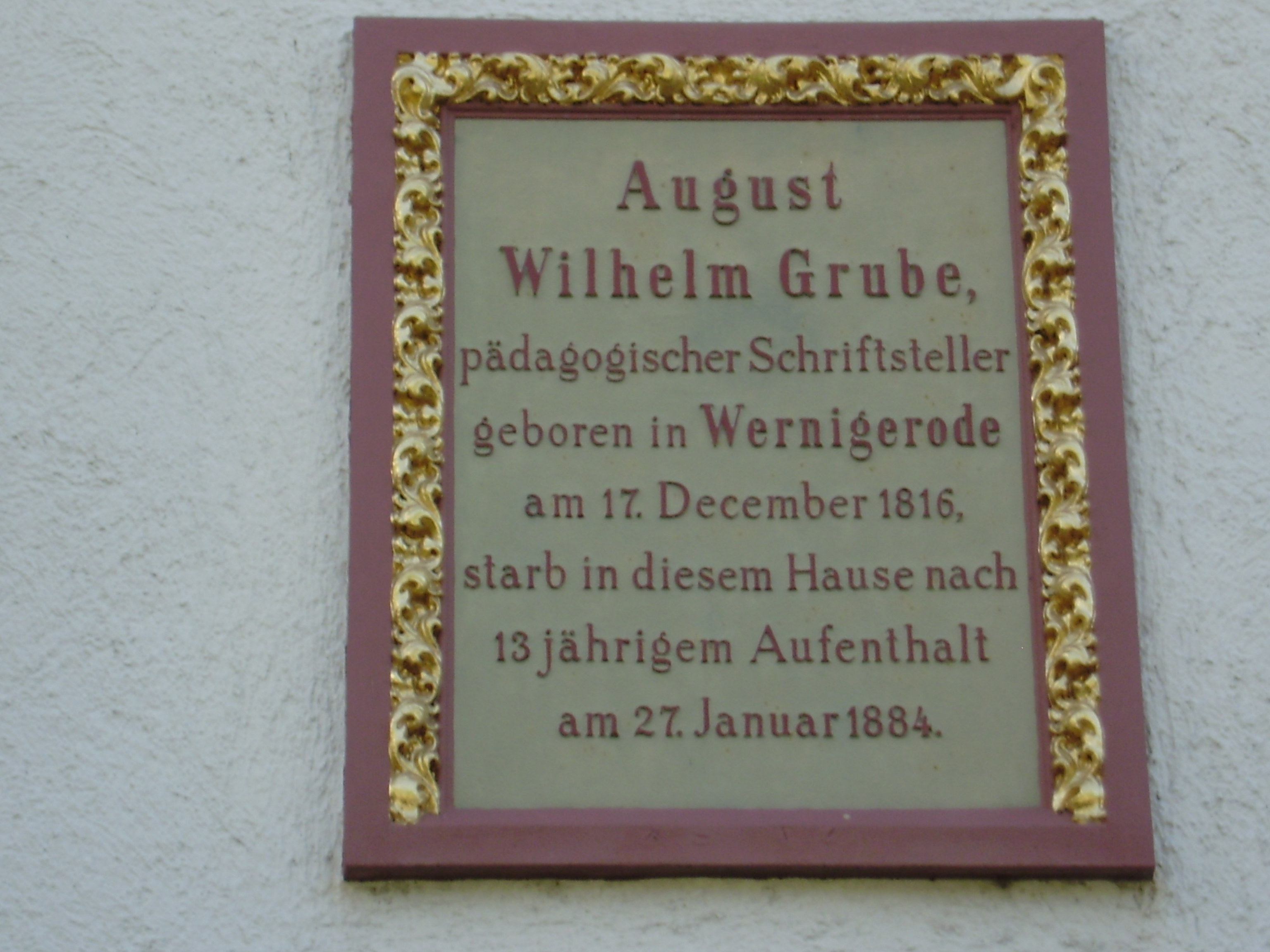 Ansitz Schedler (Haus zum Walsertal), Schedlerstr 8, Bregenz (Vorarlberg, Austria), Erinnerungstafel an den deutschen Pädagogen und Schriftsteller August Wilhelm Grube, der durch seine Veröffentlichungen zur Rechenmethodik und volkstümliche Werke Bekanntheit erlangte, ab 1848 dauerhaft bei einem Fabrikbesitzer in Hard (Vorarlberg) arbeitete und sich 1866 als freier Schriftsteller in dieses Bregenzer Anwesen zurückzog.